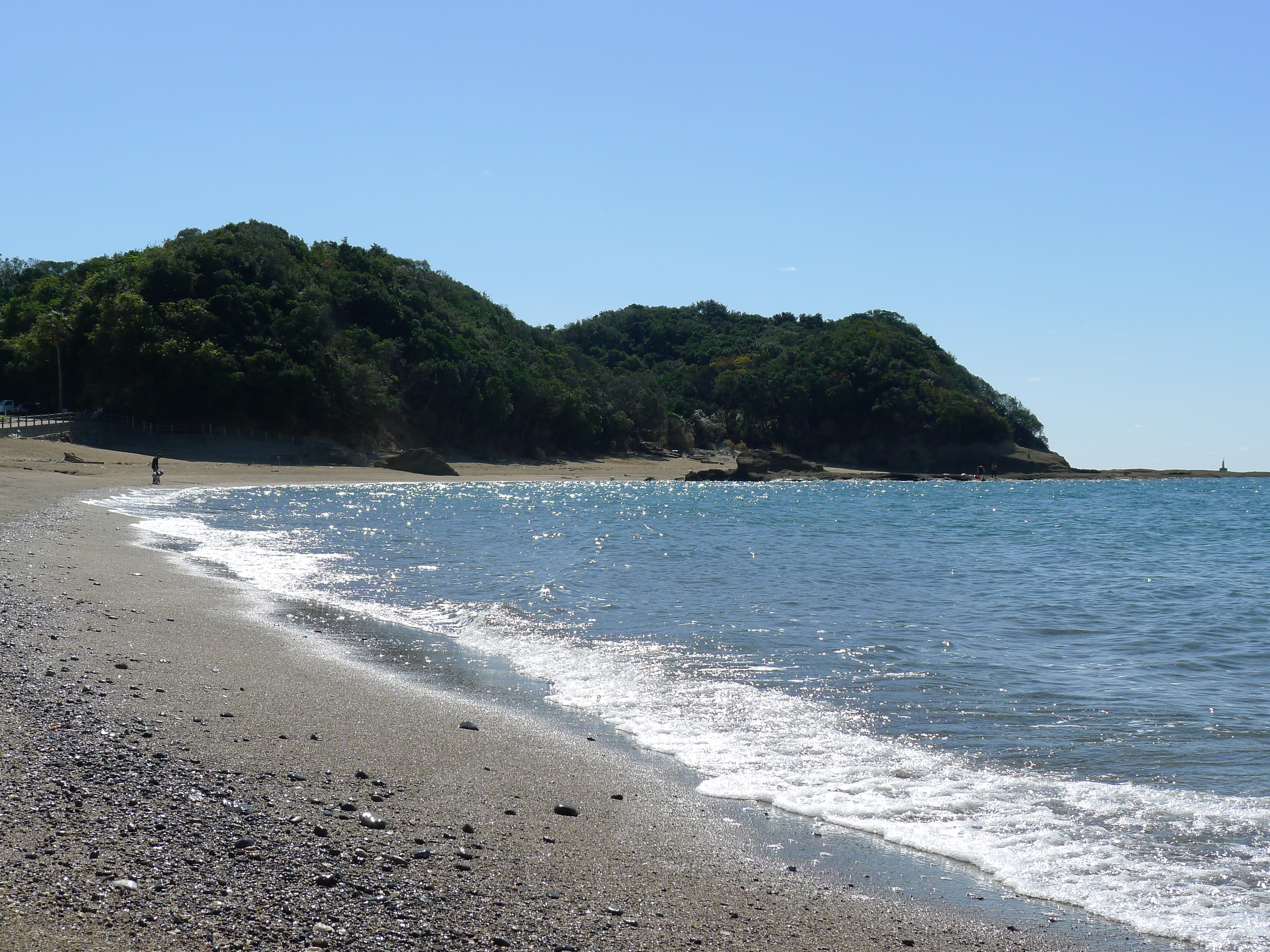 熊野古道紀伊路の名勝・千里の浜（和歌山県みなべ町）